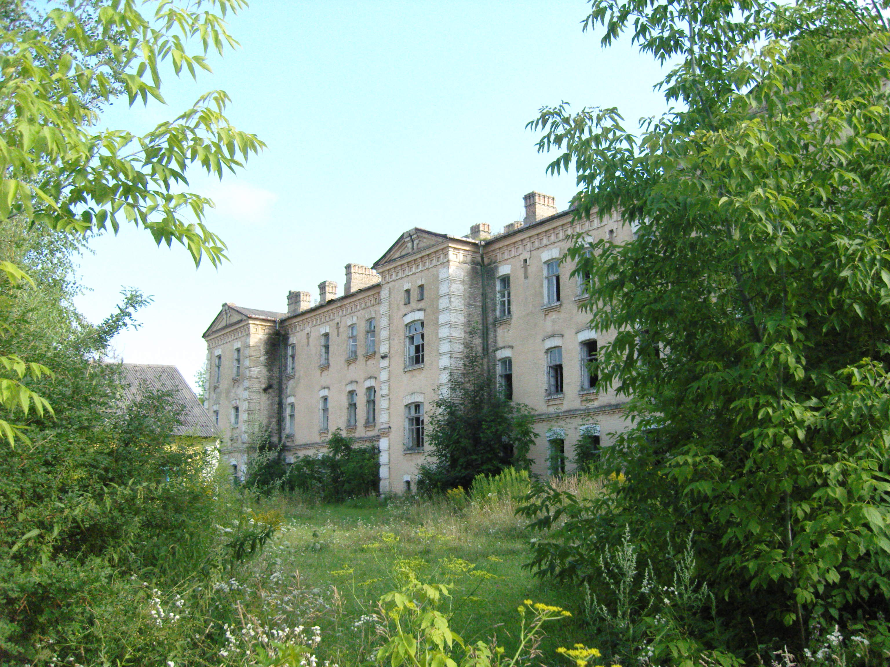 Byłe przedwoenne koszary 12 pułku ułanów podolskich w Białokrynicy na Ukrainie - stan w 2009